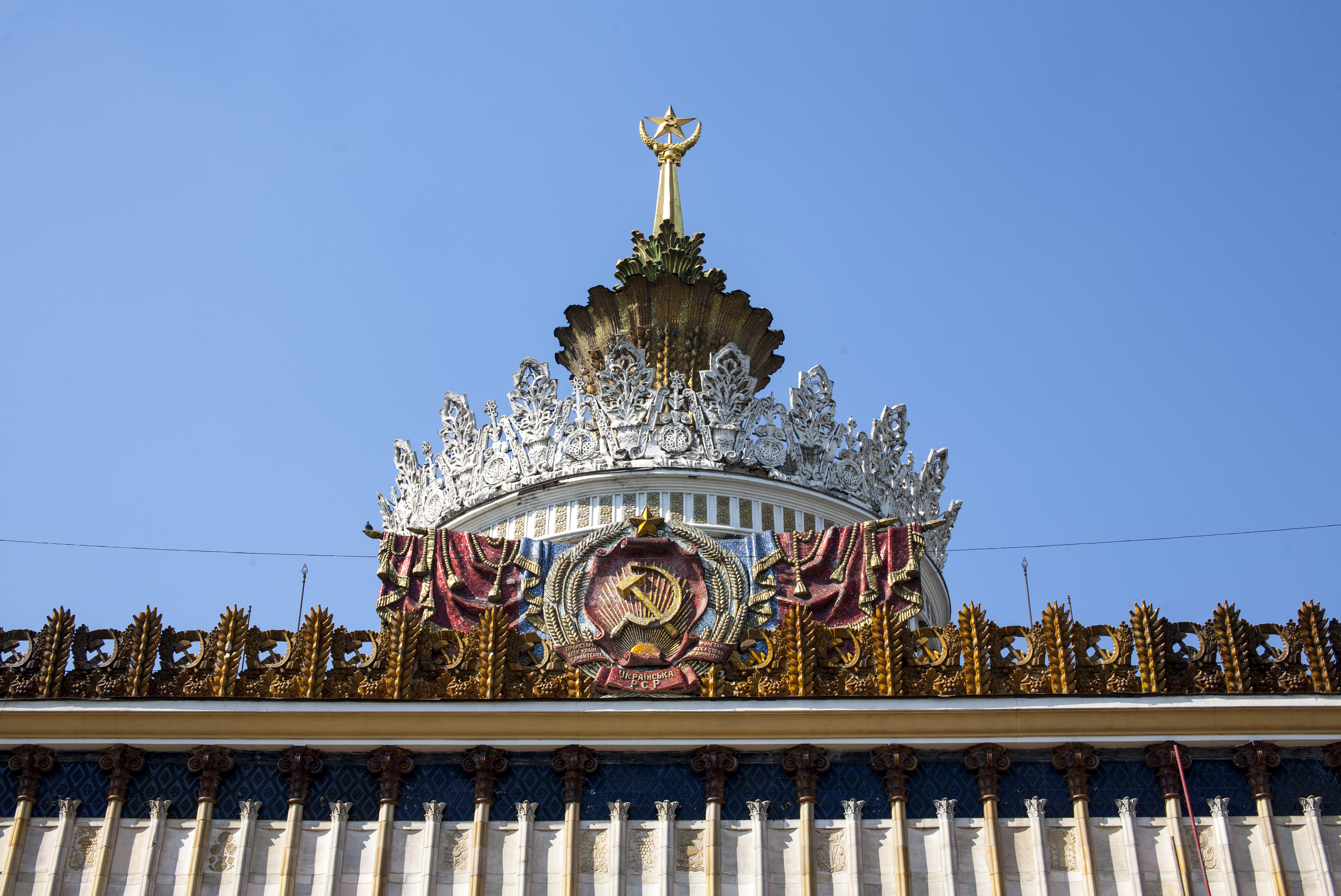 Территория Выставки достижений народного хозяйства. Вид на вход в павильон №58 («Украина»). Построен как павильон «Украина» в 1939 году по проекту архитекторов А. Тация и К. Иванченко. После перестройки на ВДНХ носил имя «Земледелие», сейчас возвращено название «Украина». Является памятником истории и культуры государственного значения.